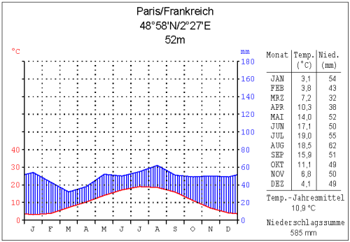 Klimadiagramm vu Paräis.